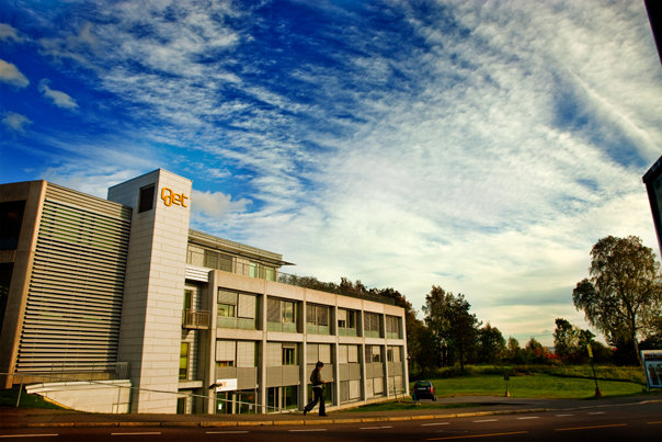 Get sitt hovedkontor i Maridalsveien 323, Nydalen i Oslo.